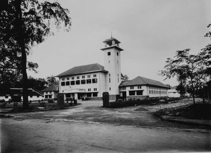 foto. Het raadhuis van Magelang